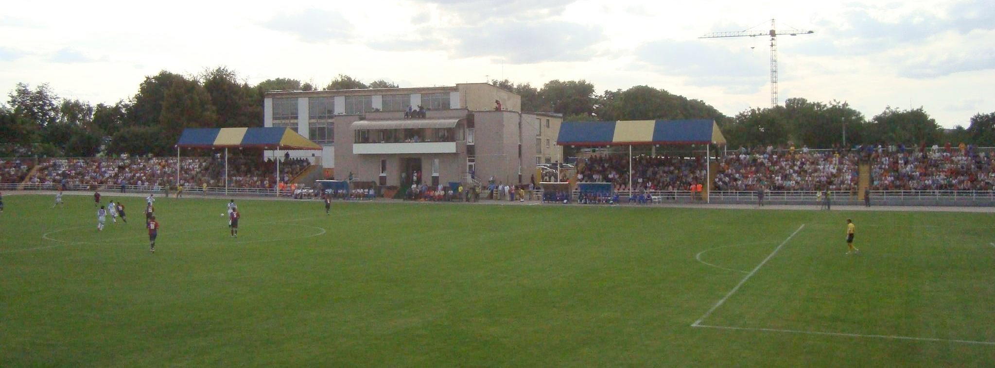 Стадіон «Колос» у Борисполі